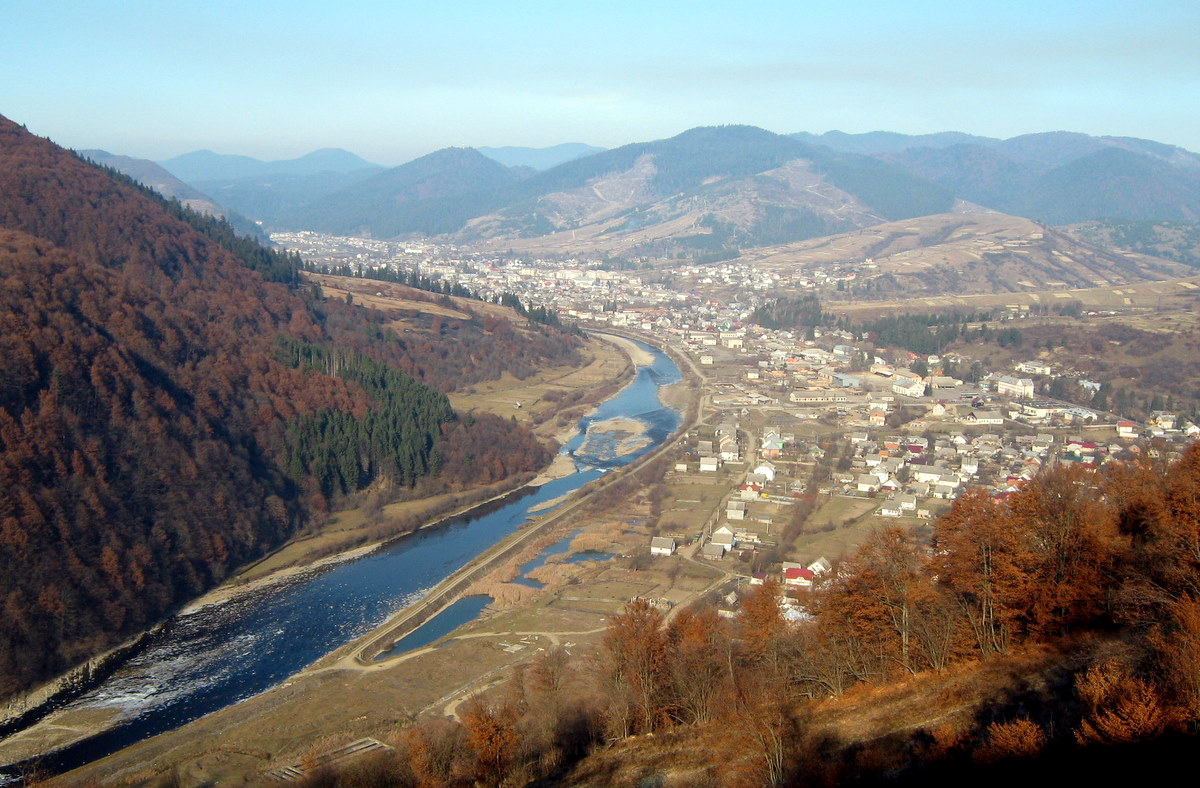 Міжгір'я. Вид з канатної дороги